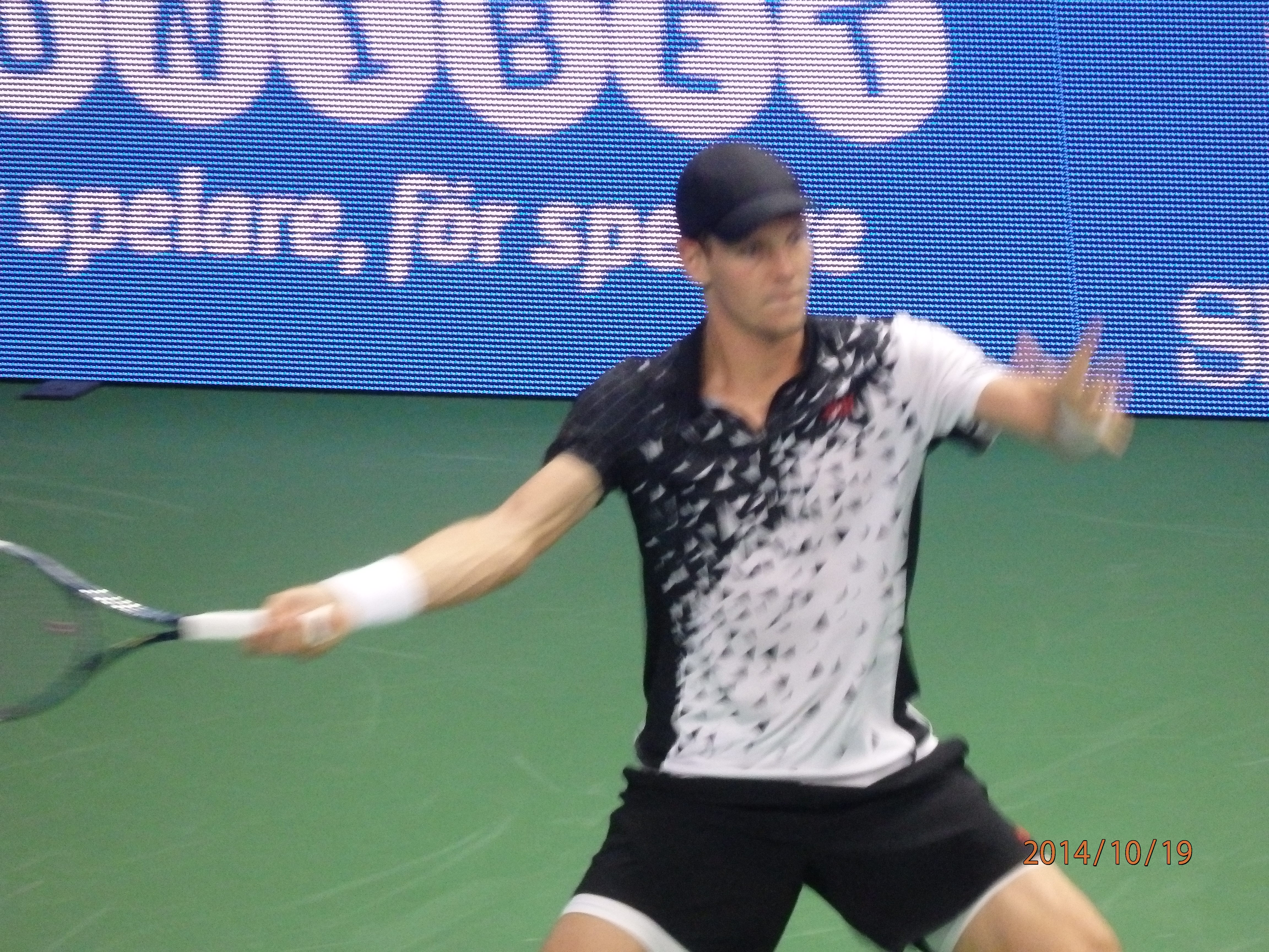 Tomas Berdych